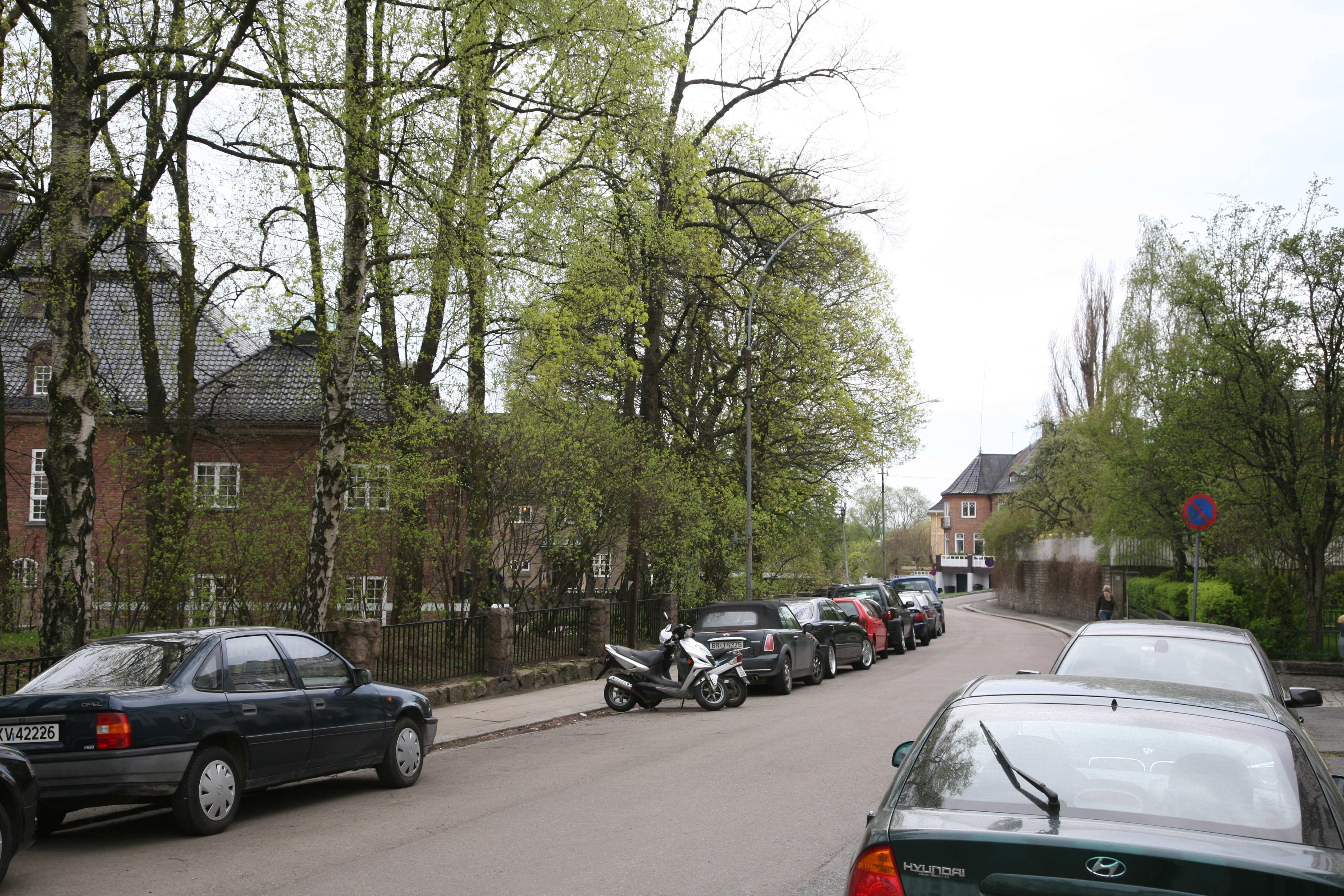 Sophus Lies gate, Oslo